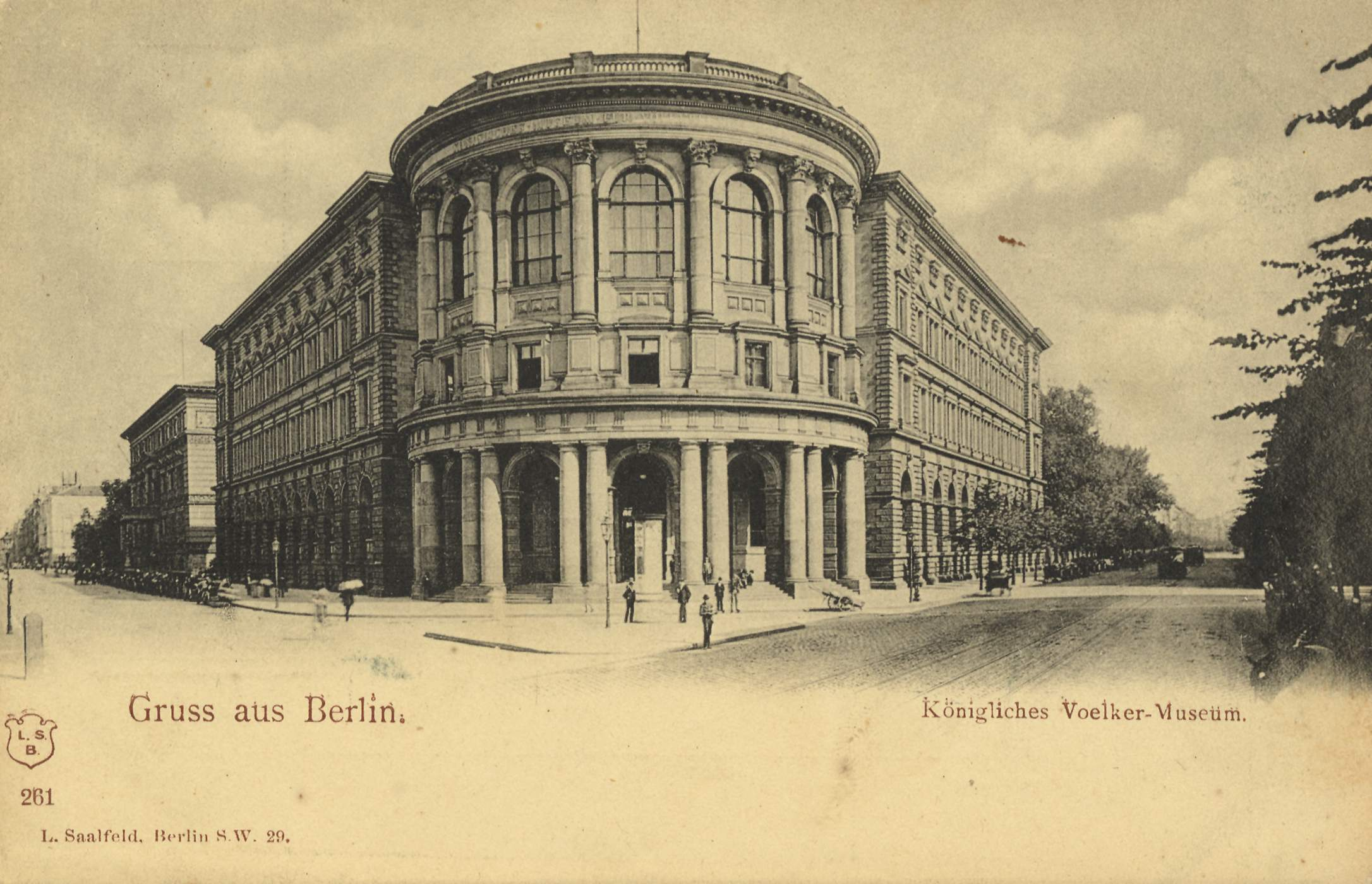 Museum für Völkerkunde (heute Ethnologisches Museum, südliche Ecke Königgrätzer Straße 120 (heute Stresemannstraße) / Prinz-Albrecht-Straße (heute Niederkirchnerstraße an der Grenze Berlin-Kreuzberg und Berlin-Mitte. Das 1886 eröffnete Gebäude wurde im Zweiten Weltkrieg zerstört. 1961 wurde die Ruine gesprengt. Das bis heute brachliegende Grundstück lag direkt an der Berliner Mauer. Das Museum wurde in Berlin-Dahlem wieder eröffnet. 1999 erhielt es seinen neuen Namen.